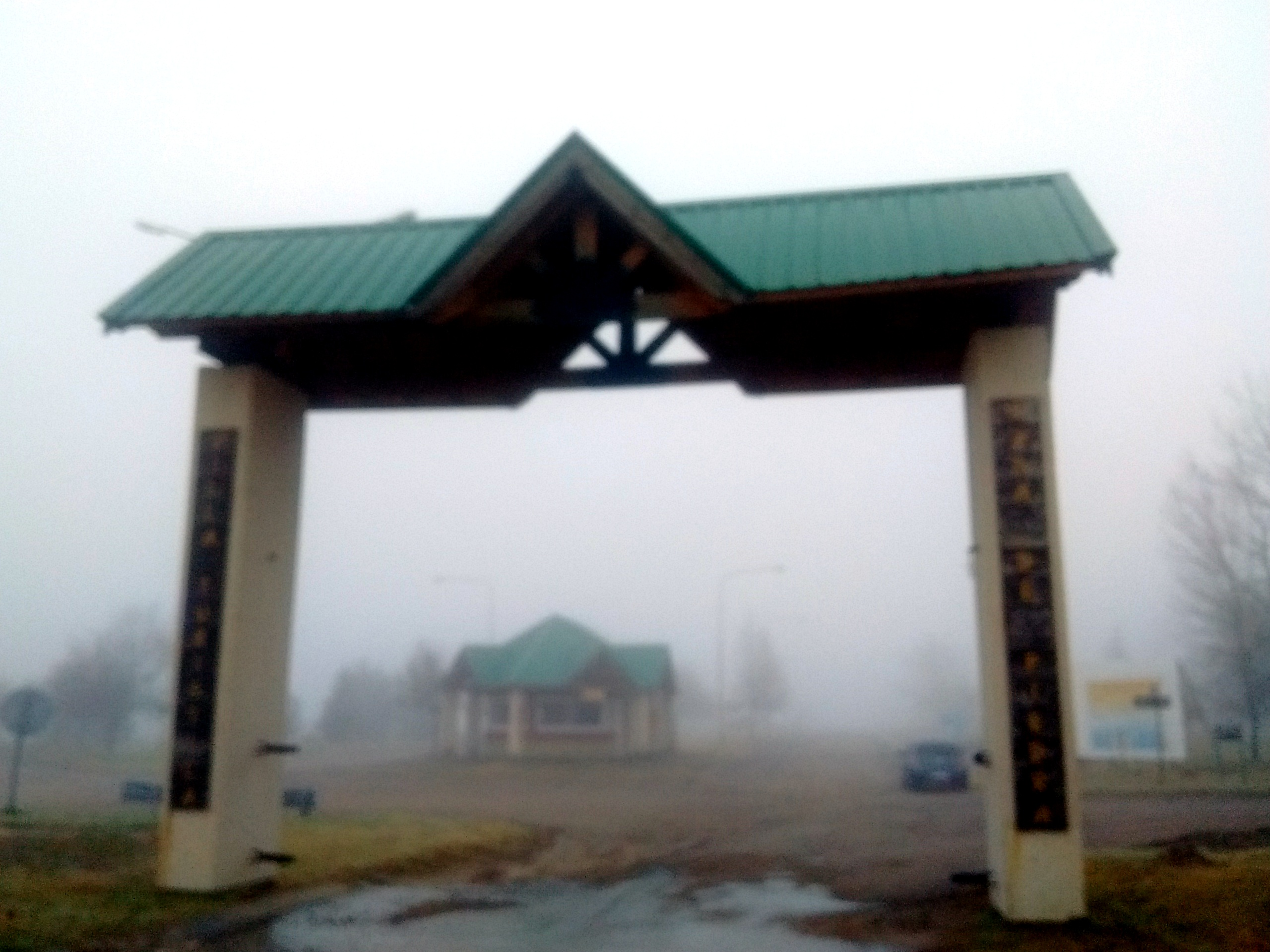 Cartel de bienvenida a la localidad